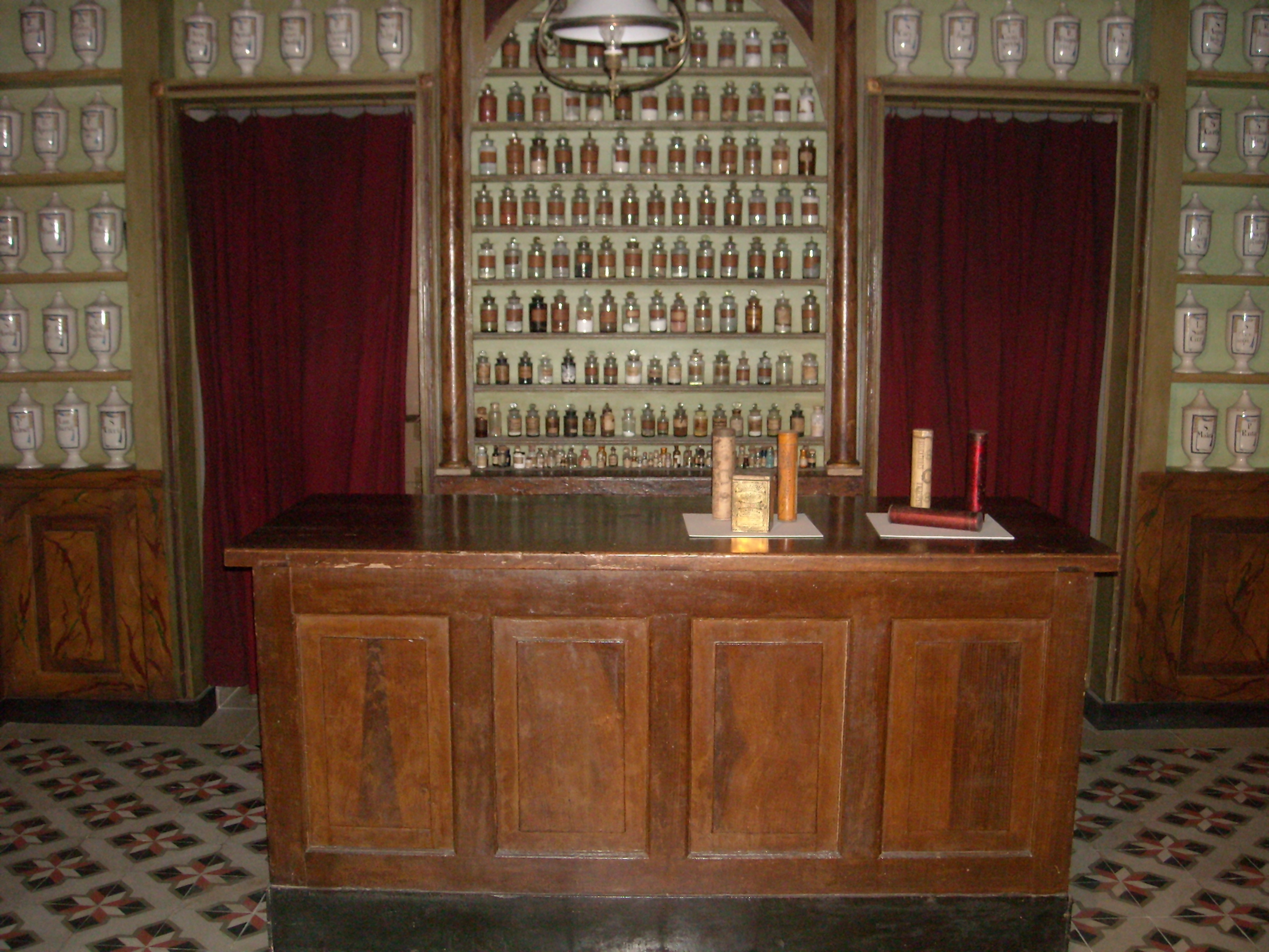 Exposició de l'antiga farmàcia Balvey, a Cardedeu (Catalunya)